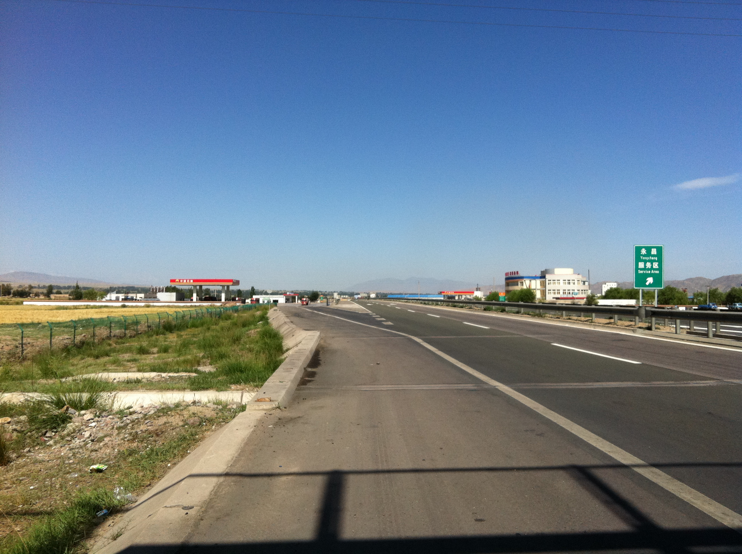 Yongchang, Jinchang, Gansu, China